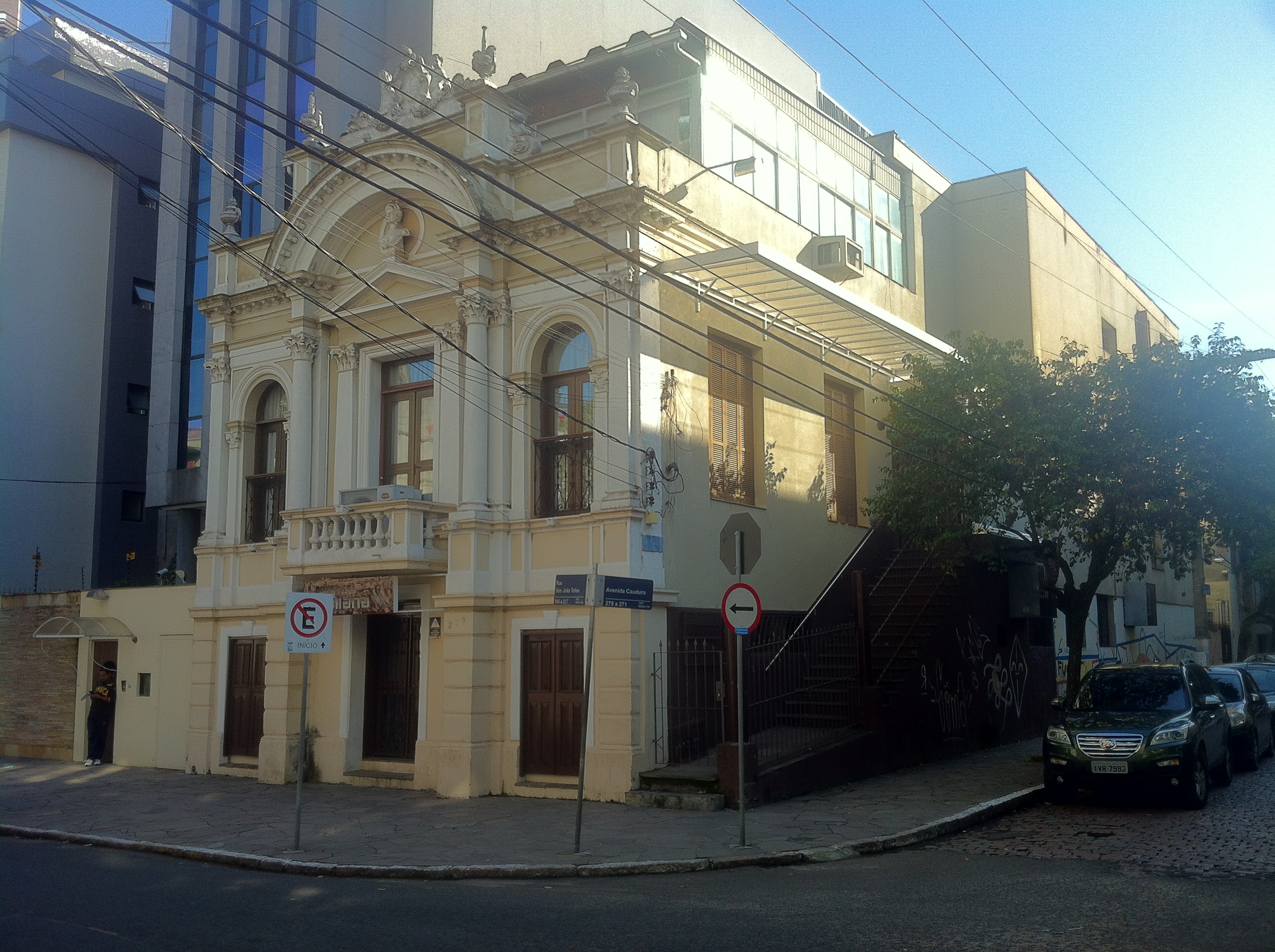 Prédio da Sociedade Italiana do RS no bairro Bom Fim em Porto Alegre